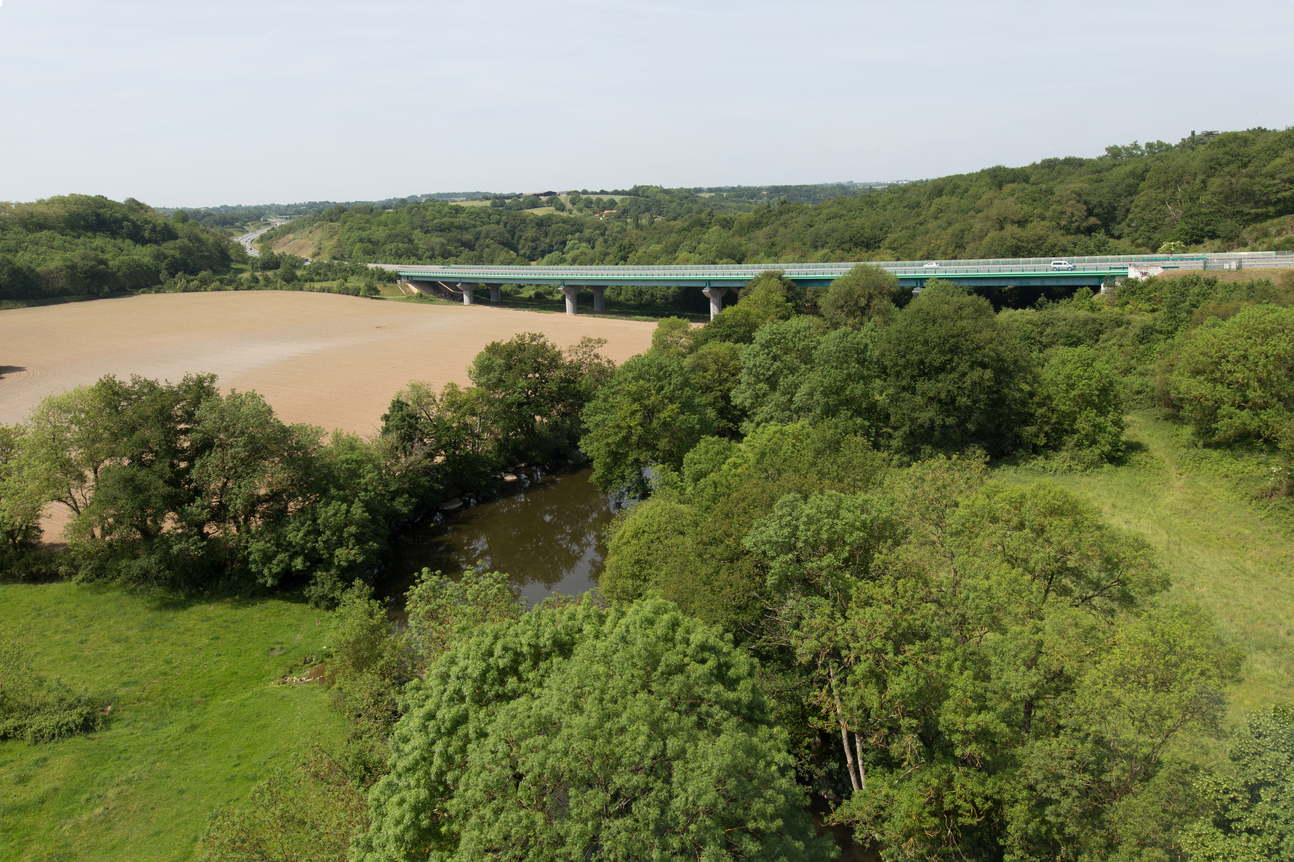 Le viaduc de l'A87 sur la Sèvre Nantaise vu depuis le viaduc de Barbin (CFV)